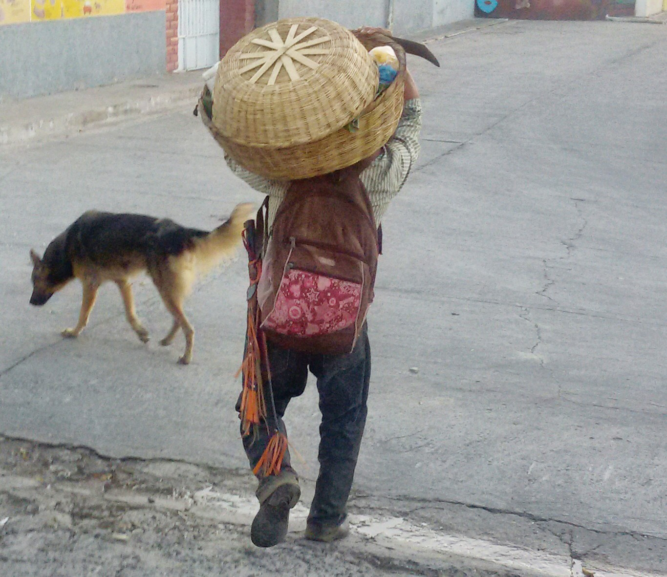 Por mucho la agricultura sigue siendo la actividad predominante en el municipio